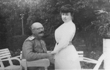 Василий Павлович Всеволожский с женой Лидией Филипповной Всеволожской в своём имении Рябово.